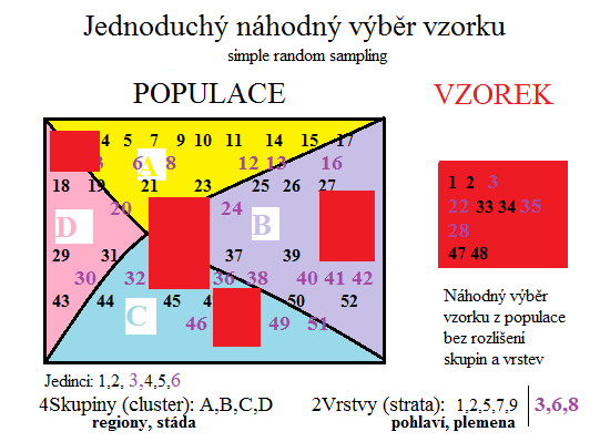 Jednoduchý náhodný výběr z populace